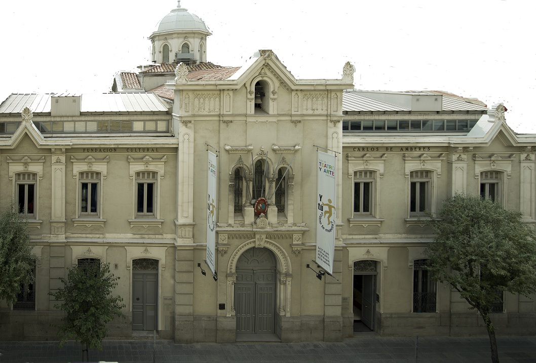 fachada (sin fondo)